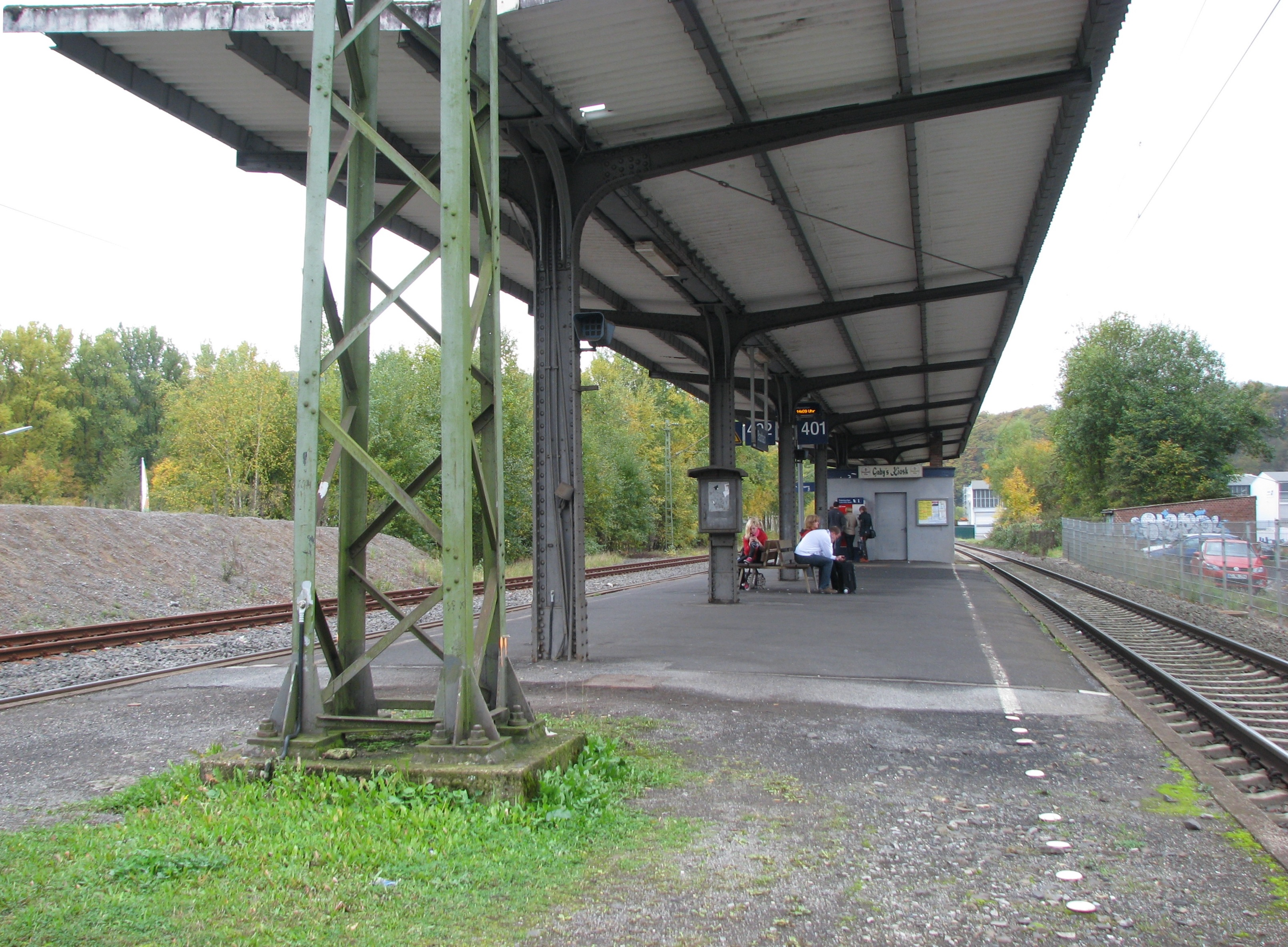 Bahnhof Brachbach an der Siegstrecke zwischen Betzdorf und Siegen.